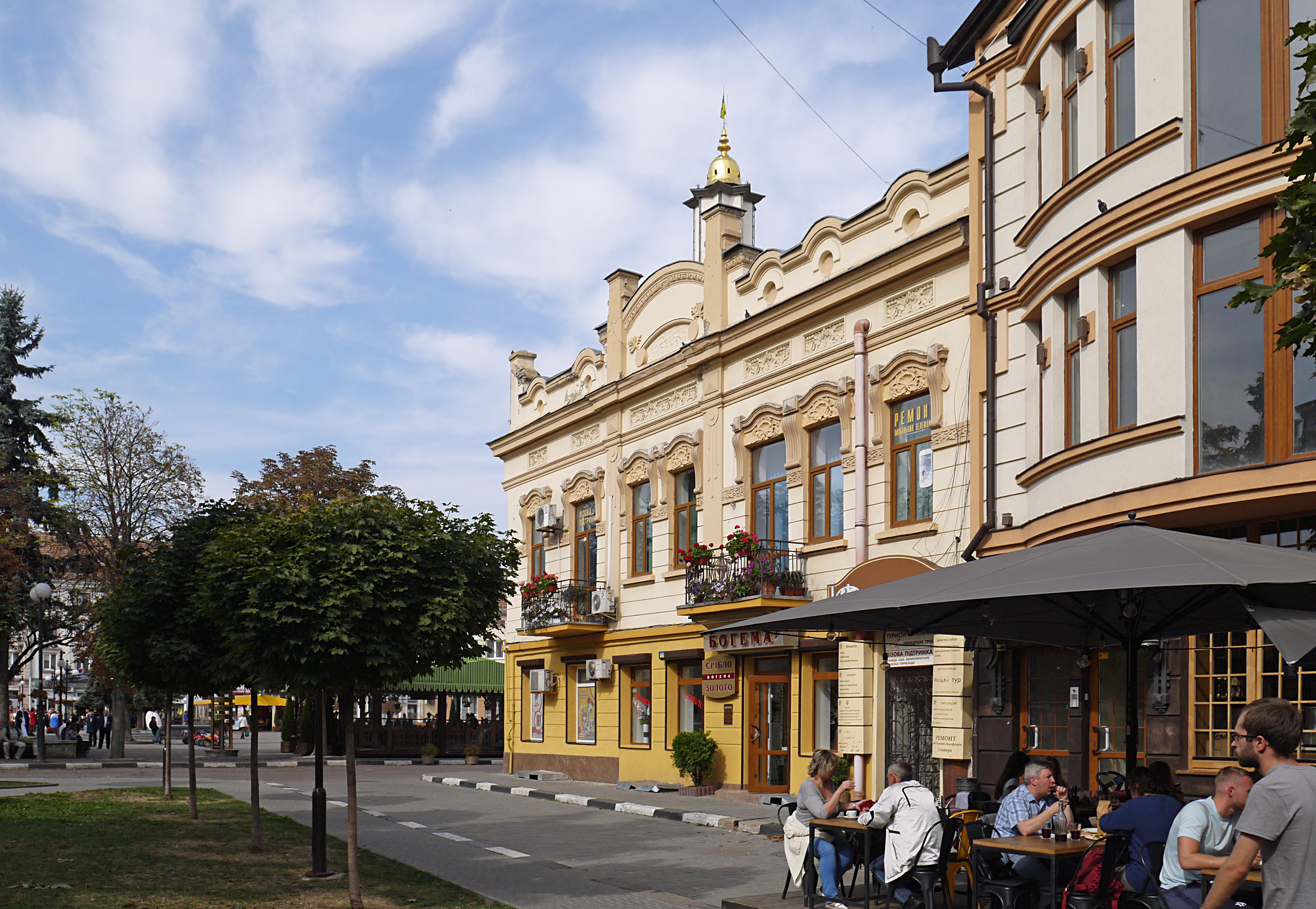 Житловий будинок (мур.), Івано-Франківськ, вул. Страчених, 3